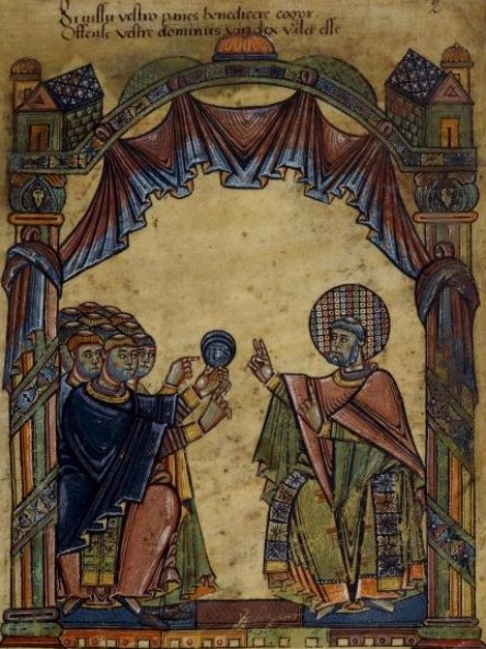 Saint Aubin assistant au IIIe concile d'Orléans